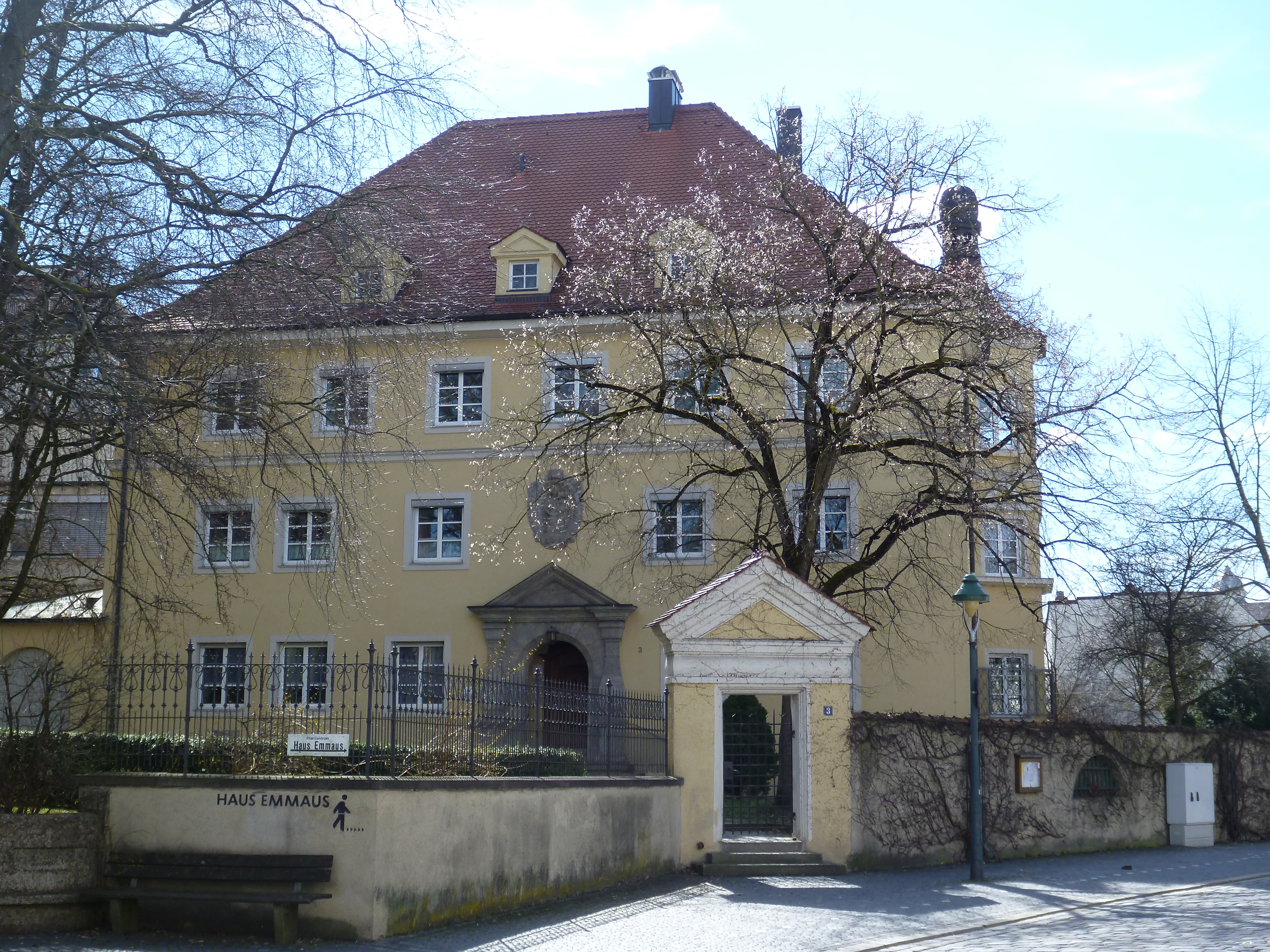 Dreigeschossiger Walmdachbau mit polygonalem turmartigem Erker und giebelbekröntem, rundbogigem Eingang, Neubarock, um 1910; Einfriedung, Mauerzug mit giebelbekröntem Portal und turmartigem Häuschen mit Haubendach, wohl aus der gleichen Zeit